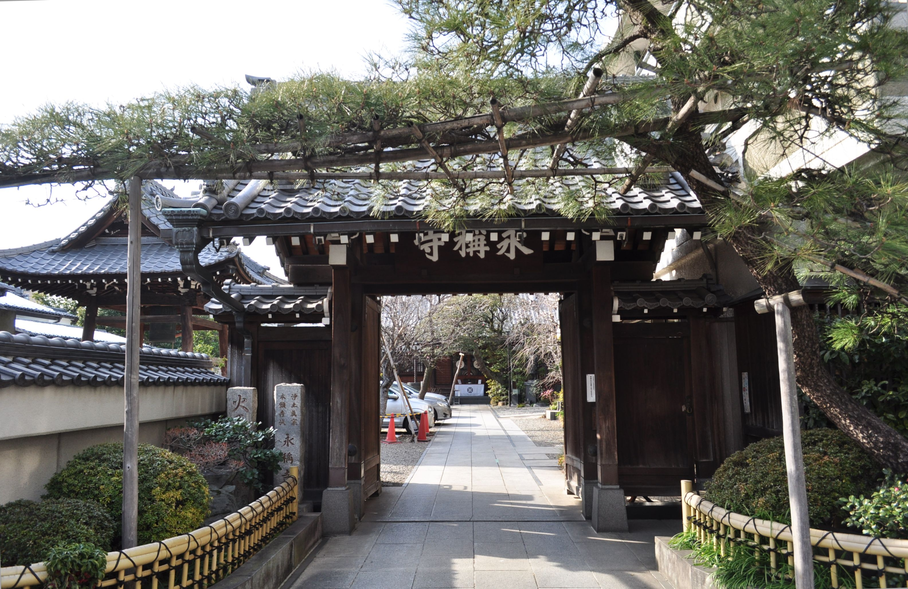 根岸 永稱寺